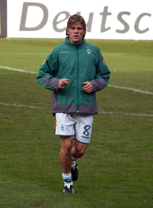 Clemens Fritz im Spiel gegen den HSV